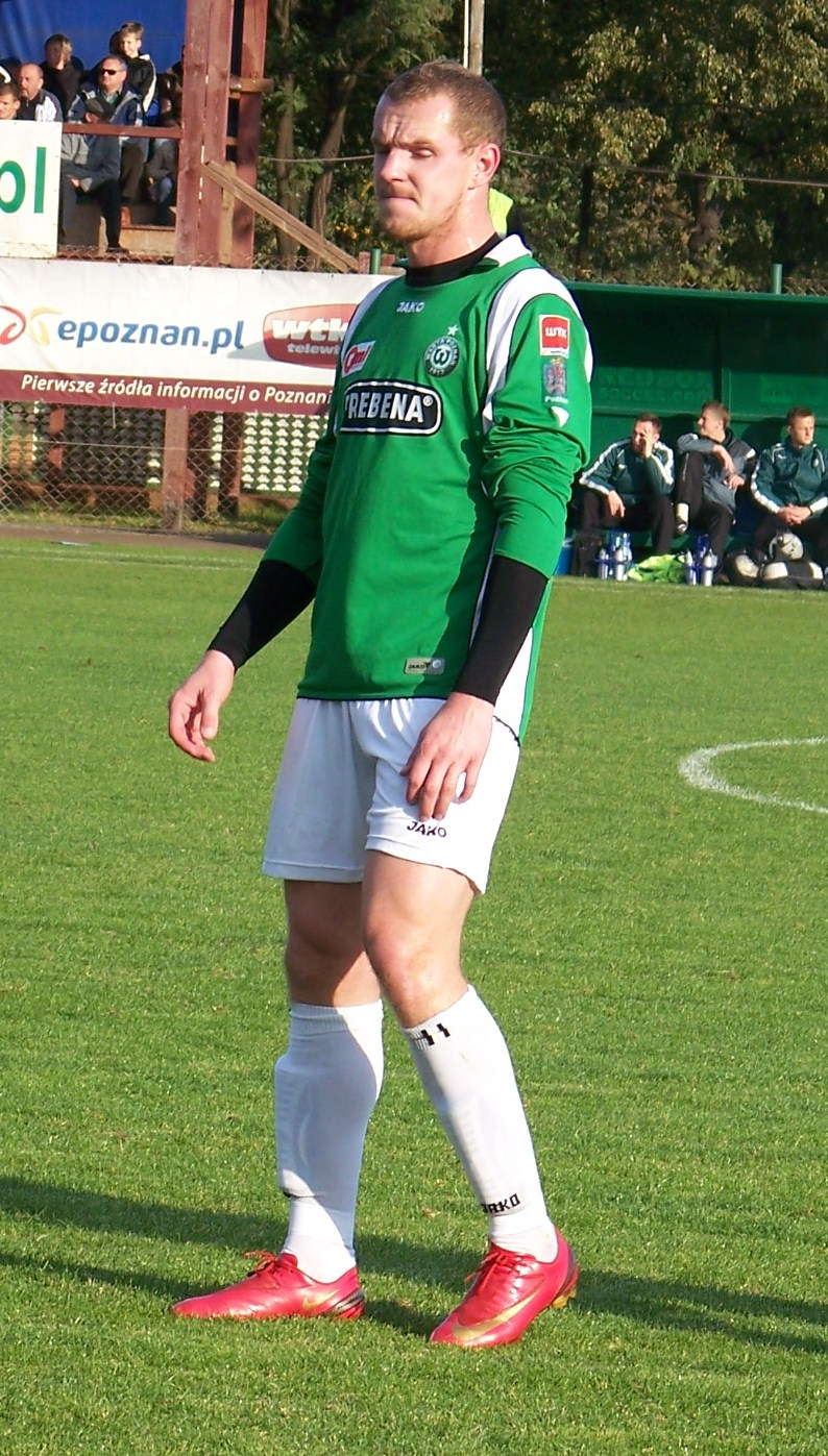 Marcin Klatt podczas meczu I ligi z Zagłębiem Lubin.